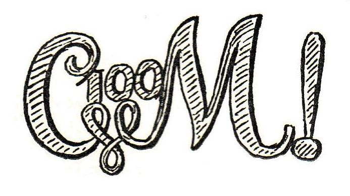 Silberner Ehrenzirkel des Corps Masovia für 100 Semester Corpszugehörigkeit